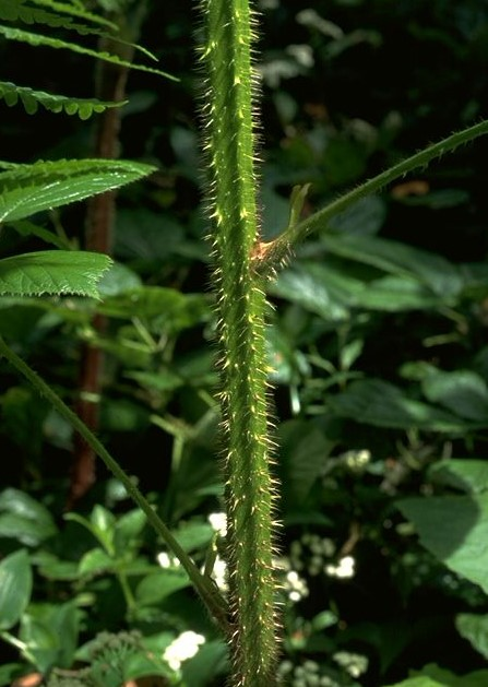 Rubus palmensis A. Hansen